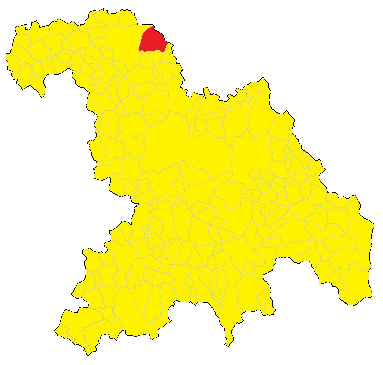 Mappa del comune di Frassineto Po (AL)